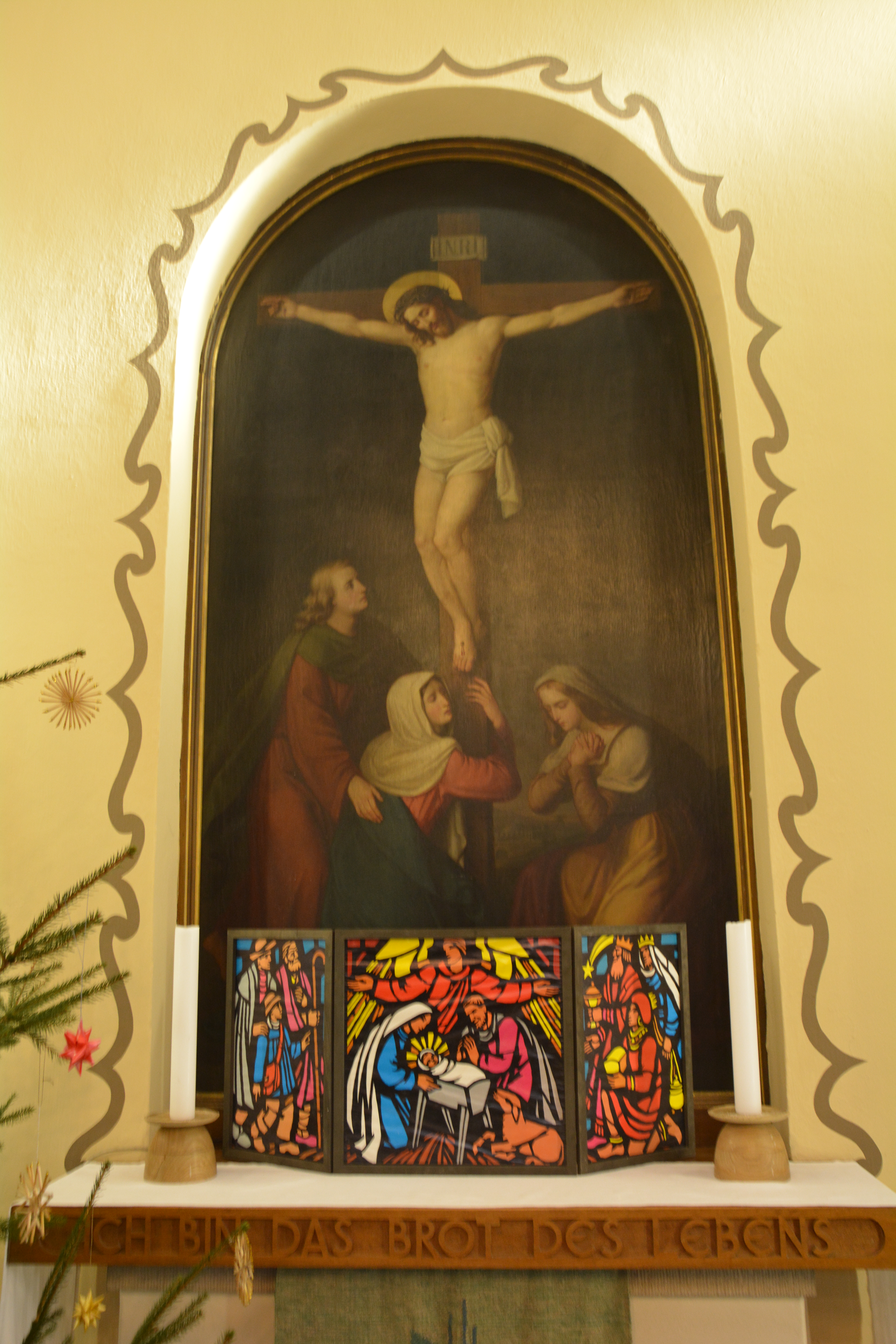 Bergkirche Kurort Kipsdorf, nach einen Entwurf von William Lossow und Max Hans Kühne 1908 erbaut. Altar